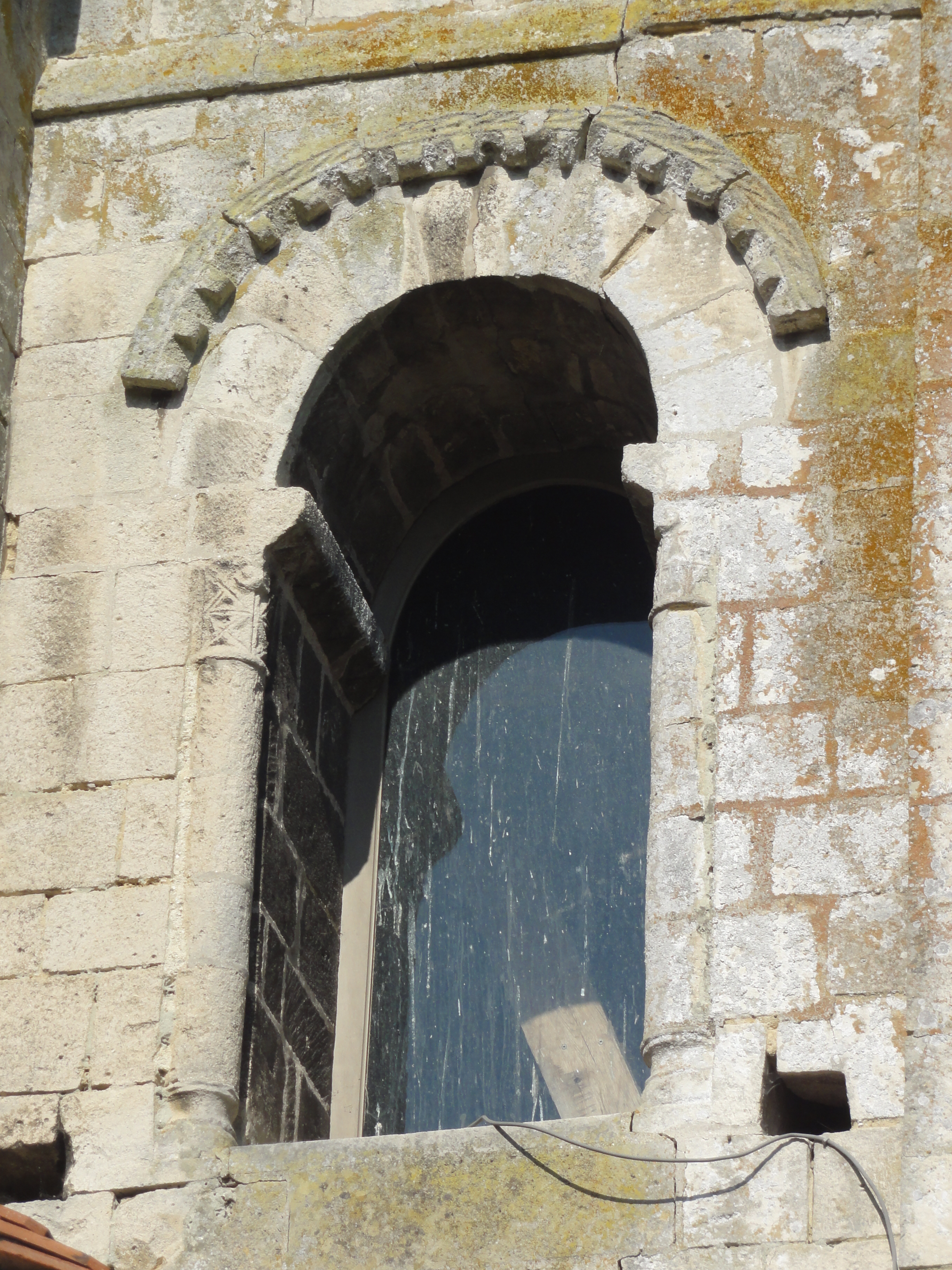 Clocher, baie orientale du 1er étage.